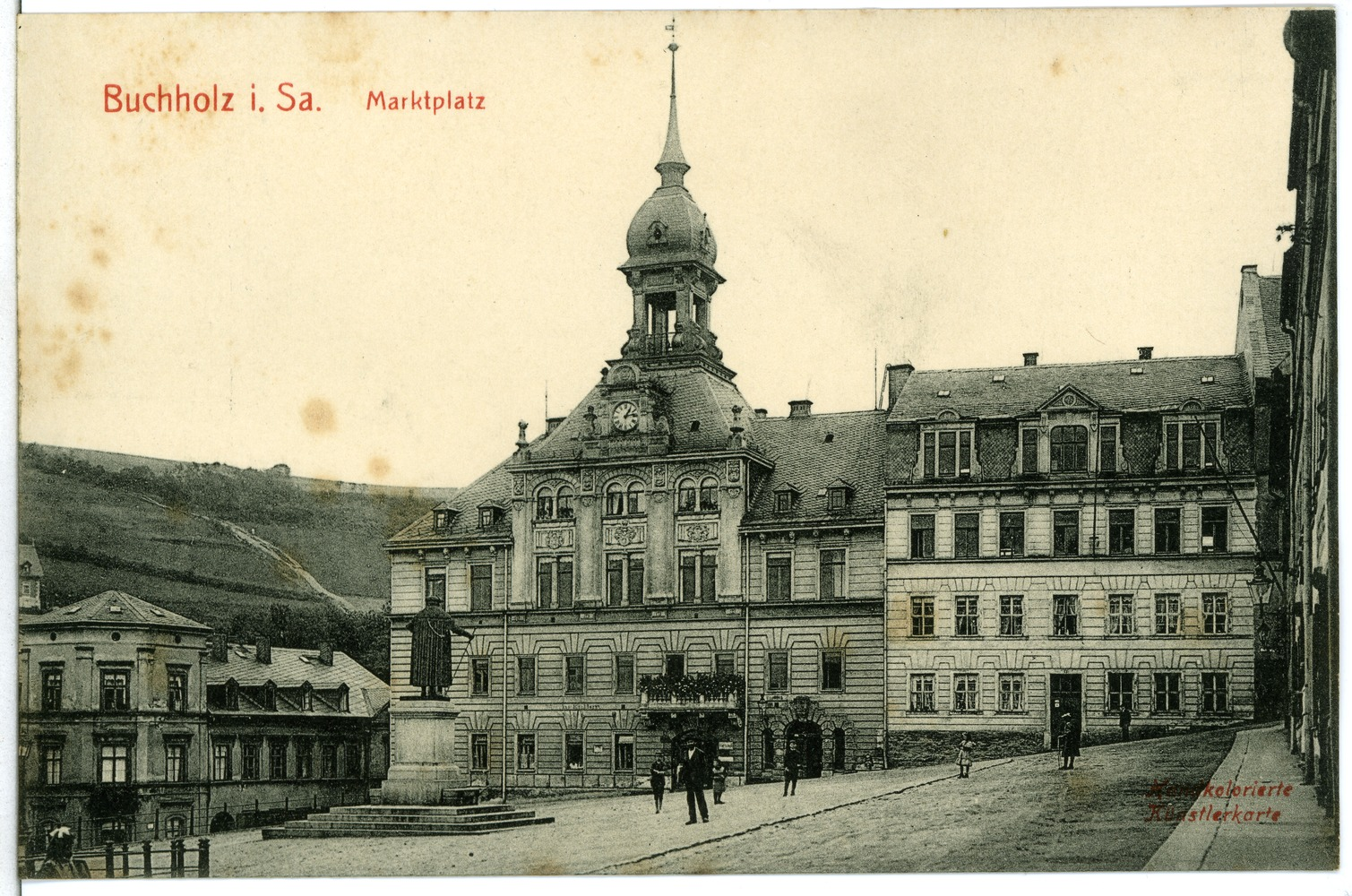 Buchholz; Marktplatz This postcard is from publisher Brück & Sohn in Meißen ( postcard has a unique number 11284 and is available in a higher resolution at the publisher. This images was uploaded in a cooperation project between Wikipedians and the publisher.